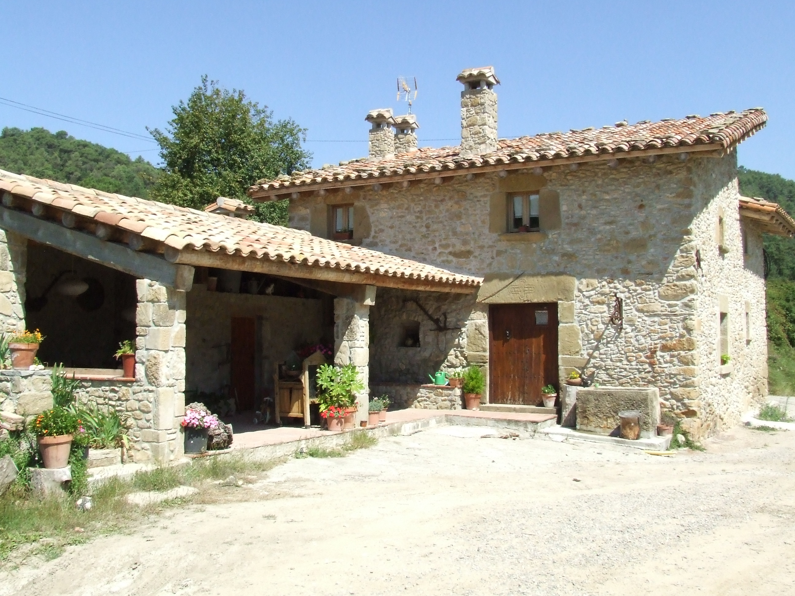 Cal Jaumet (Castellcir, Moianès)